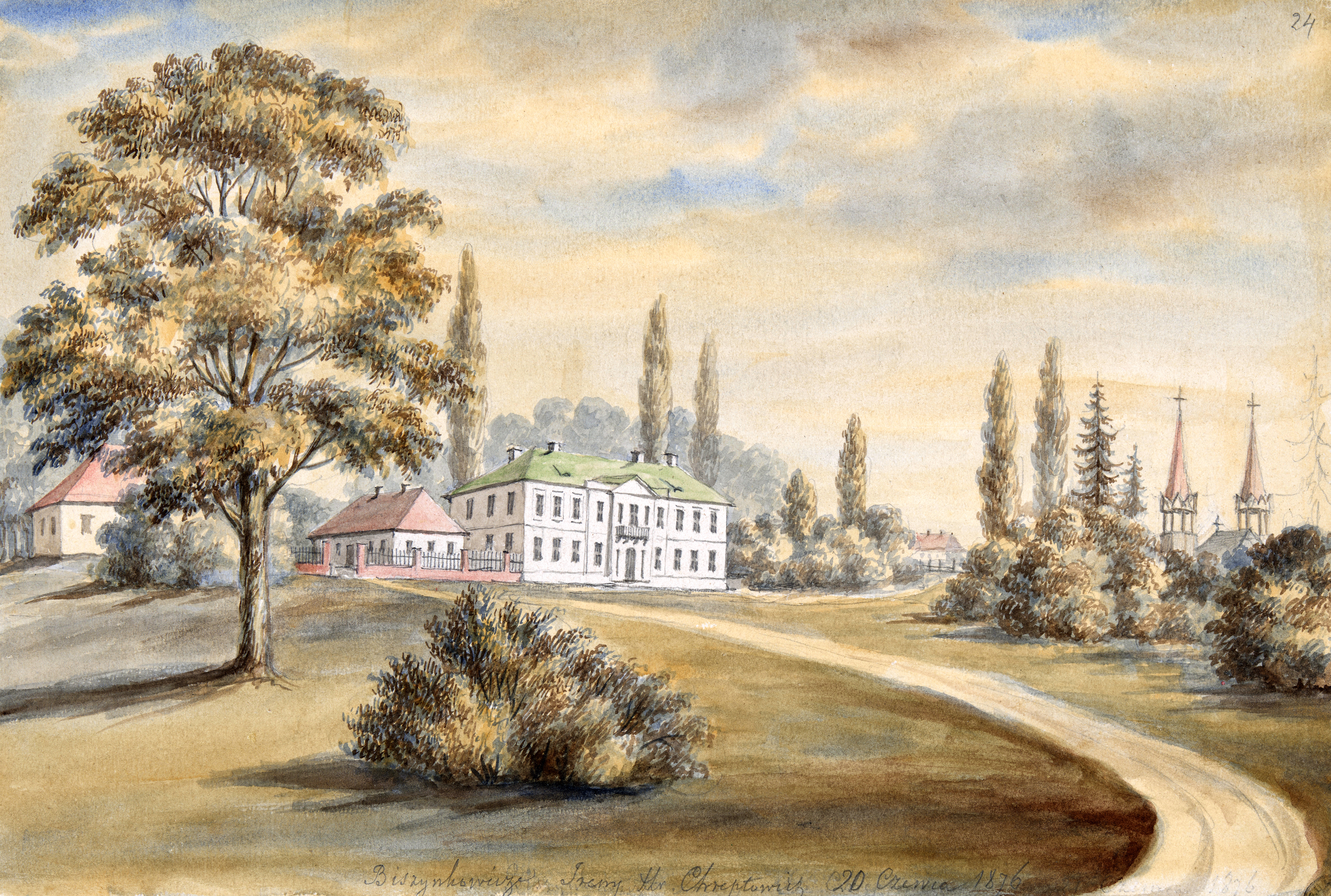 Беларуская (тарашкевіца): Бешанковічы (Biešankovičy), сядзіба Храптовічаў (Chraptovič)